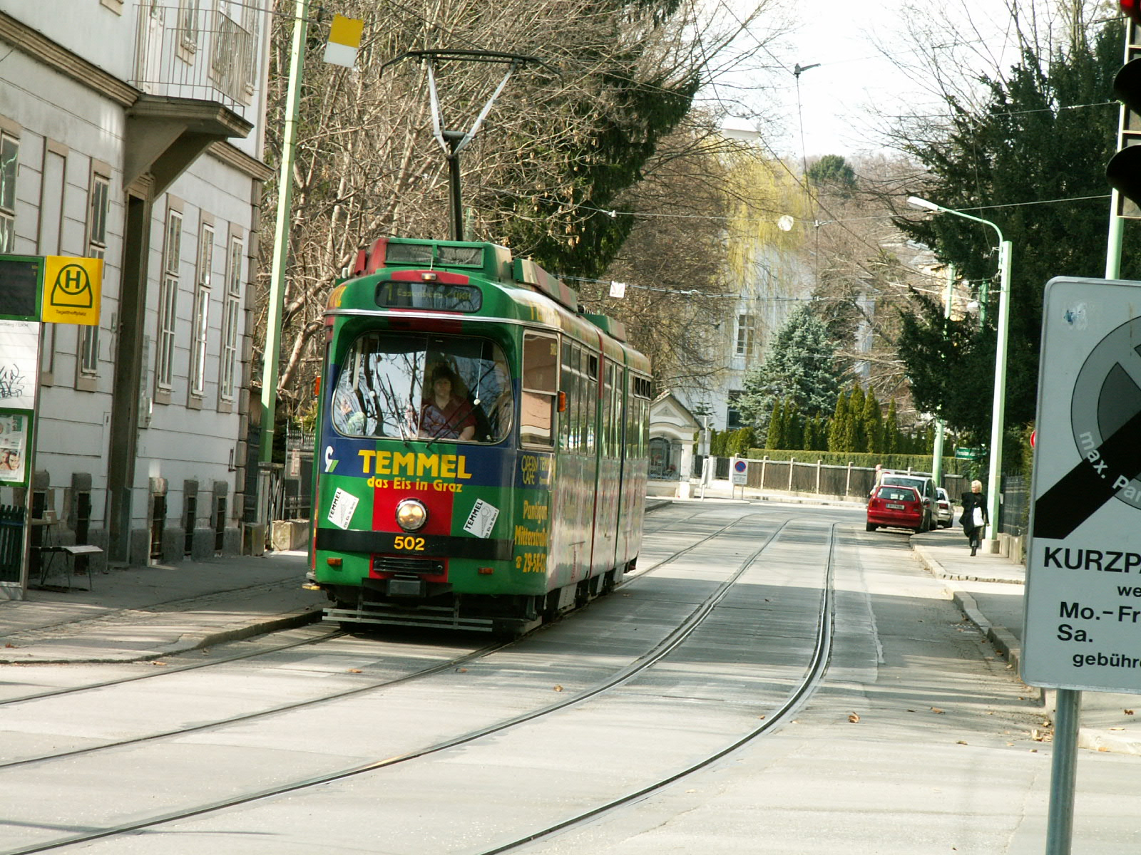 Beschreibung, Quelle Bildbeschreibung: Straßenbahnzug auf der Linie 1 in Graz, Haltestelle Tegetthofplatz Quelle: selbst fotografiert Fotograf/Zeichner: Markus Urban Datum: 01.04.2006